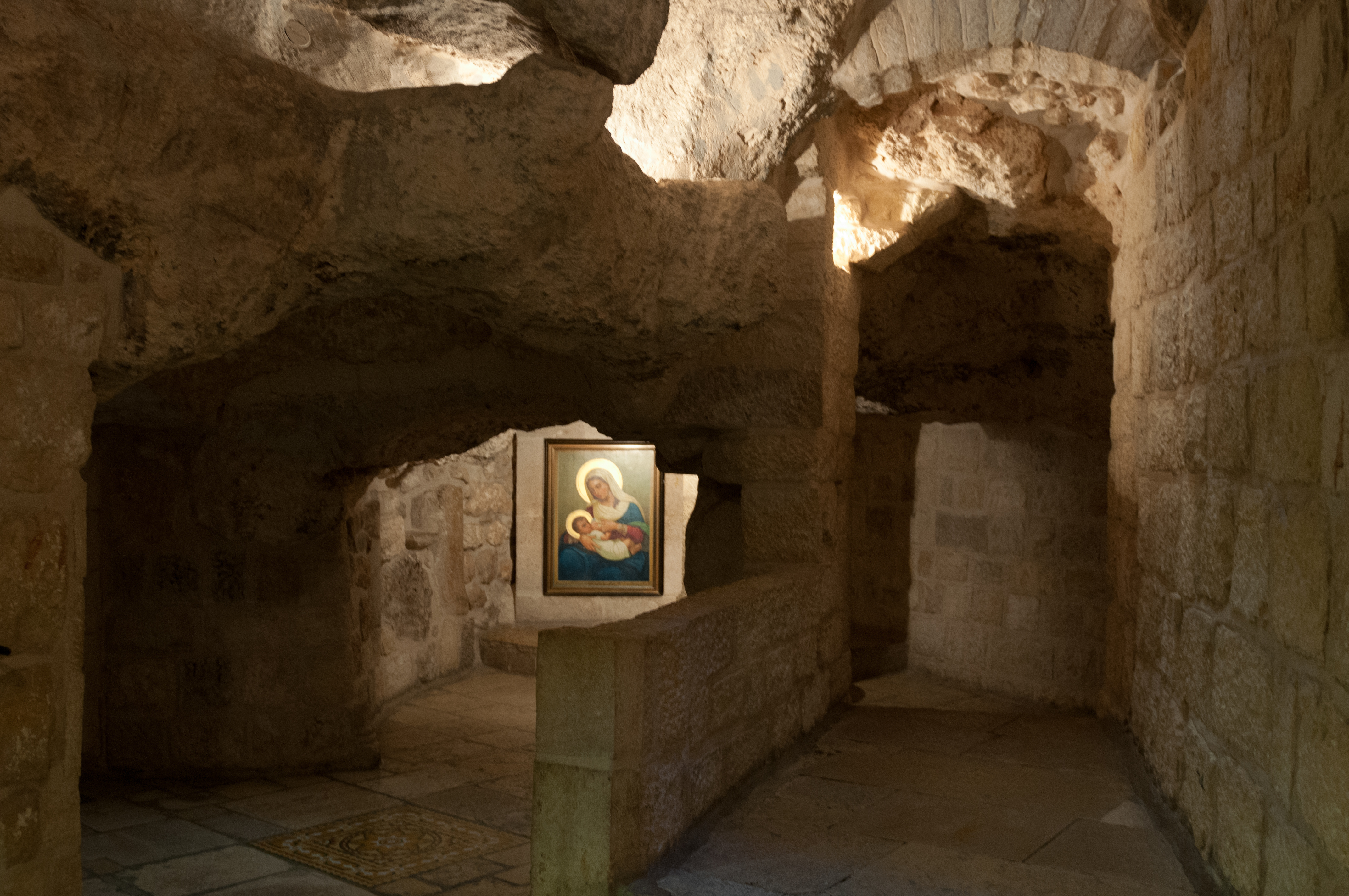 Altstadt von Bethlehem, Palästina